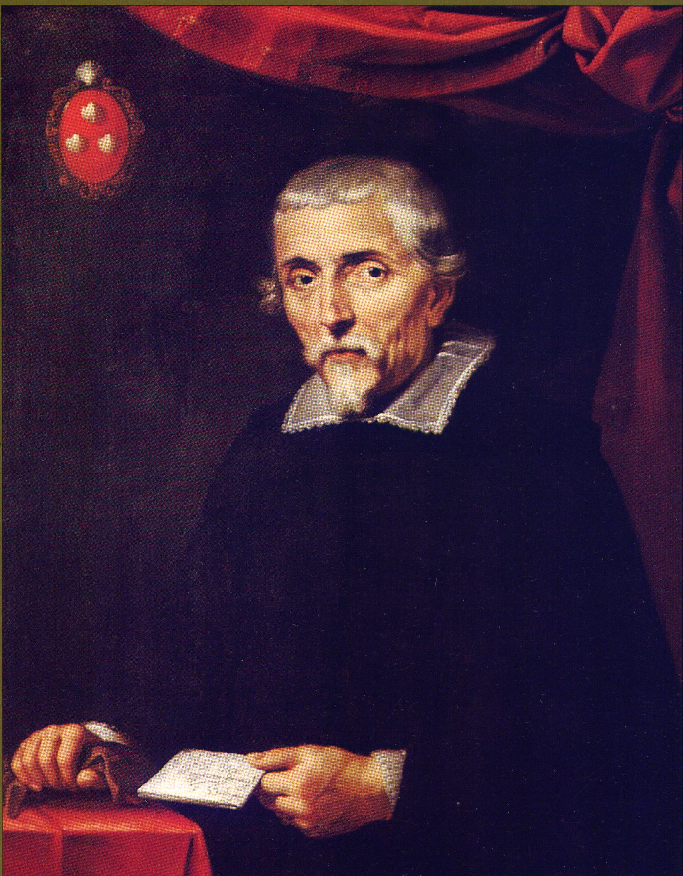 L'orfèvre bruxellois Jean Jacobs, 17ème siècle, par Guido Reni